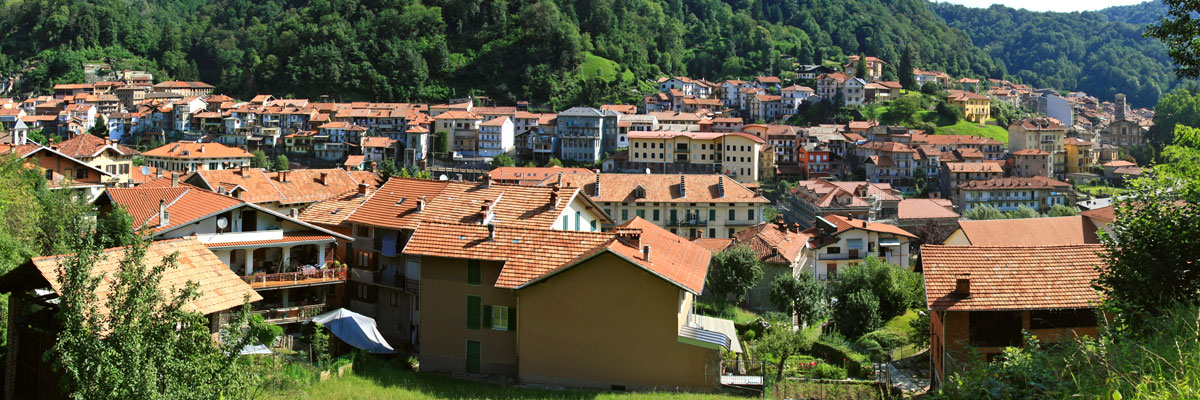 Panoramica di Coggiola (BI)